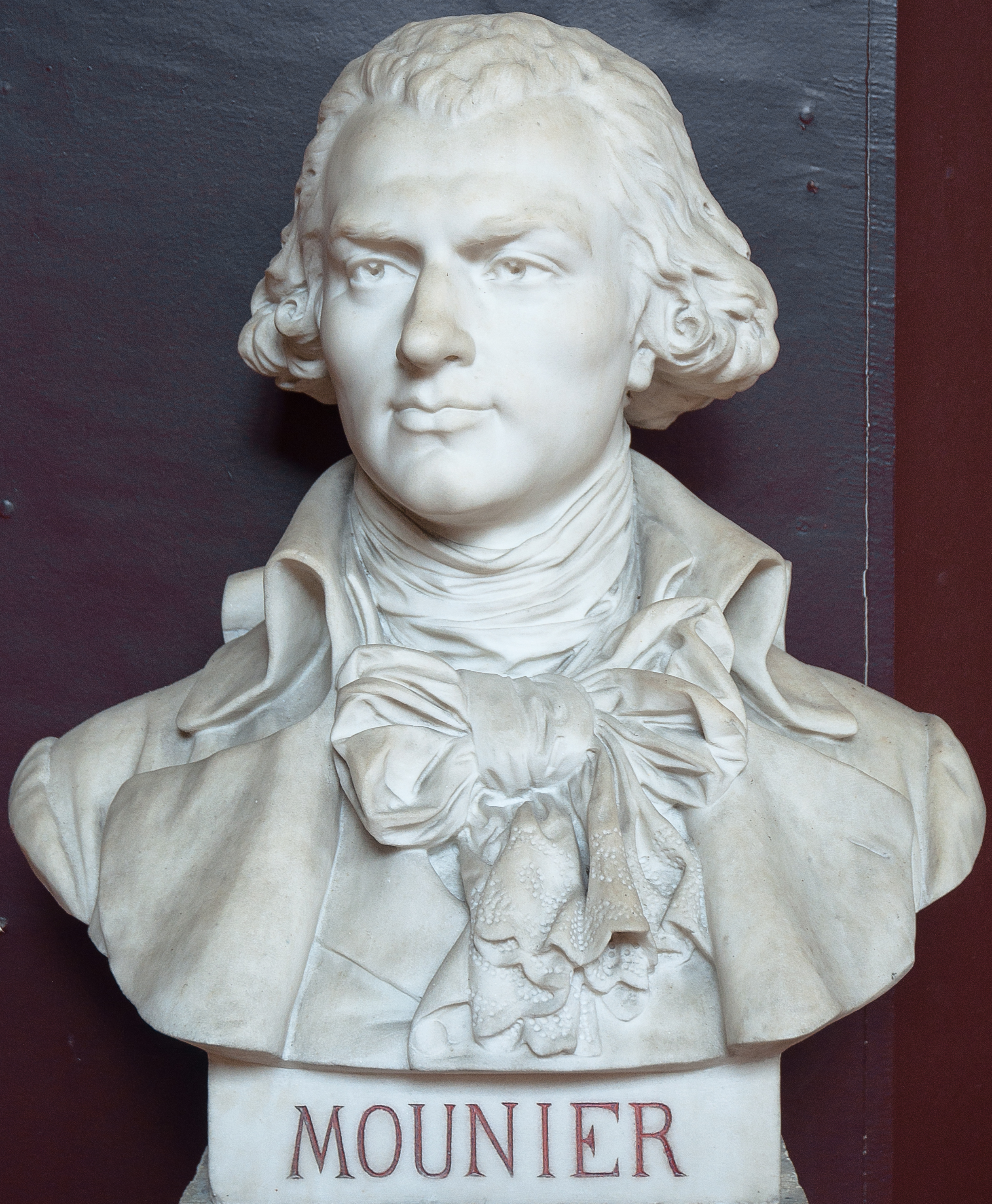 Buste de Jean-Joseph Mounier -- Salle du serment du jeu de paume -- Versailles